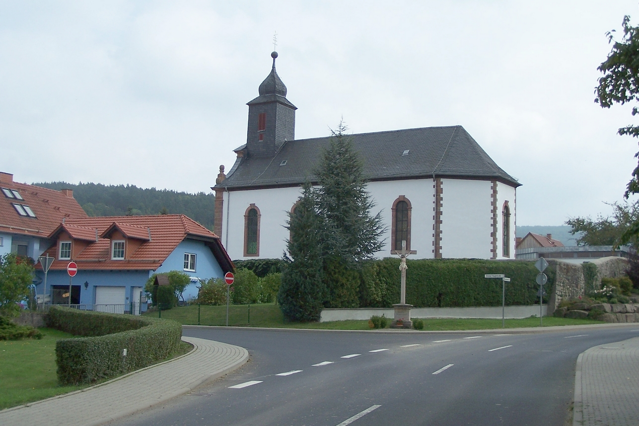 Die Ortsmitte von Bremen/Rhön.